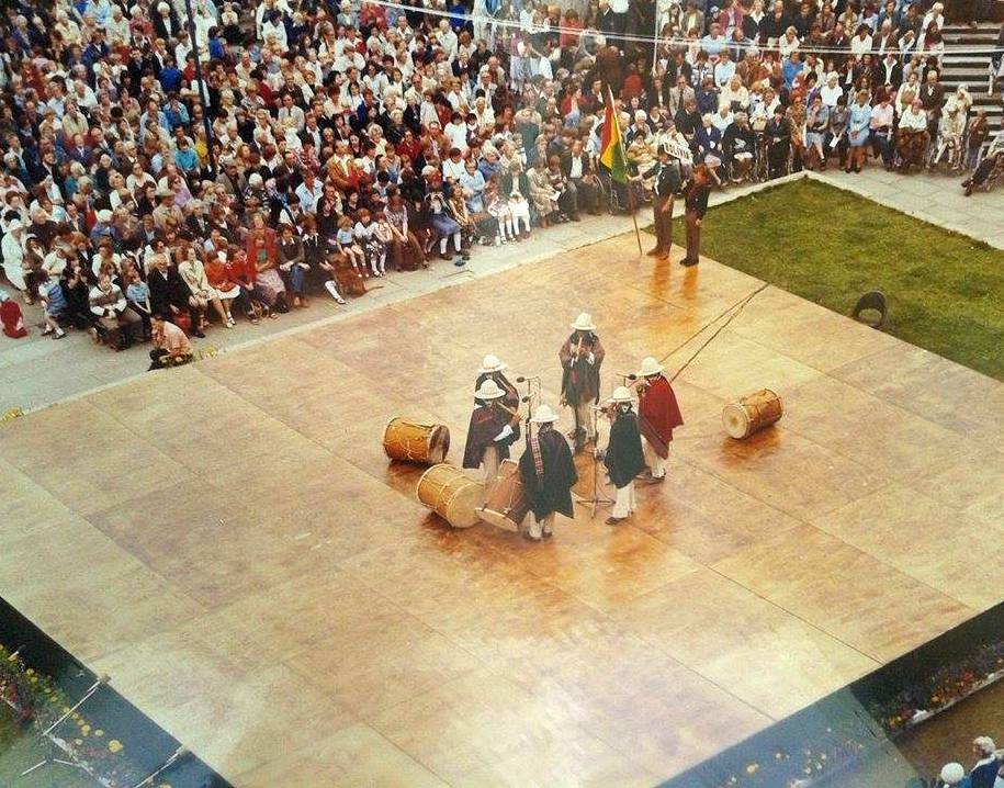 Presentación del Grupo Ruphay en Festivales Internacionales